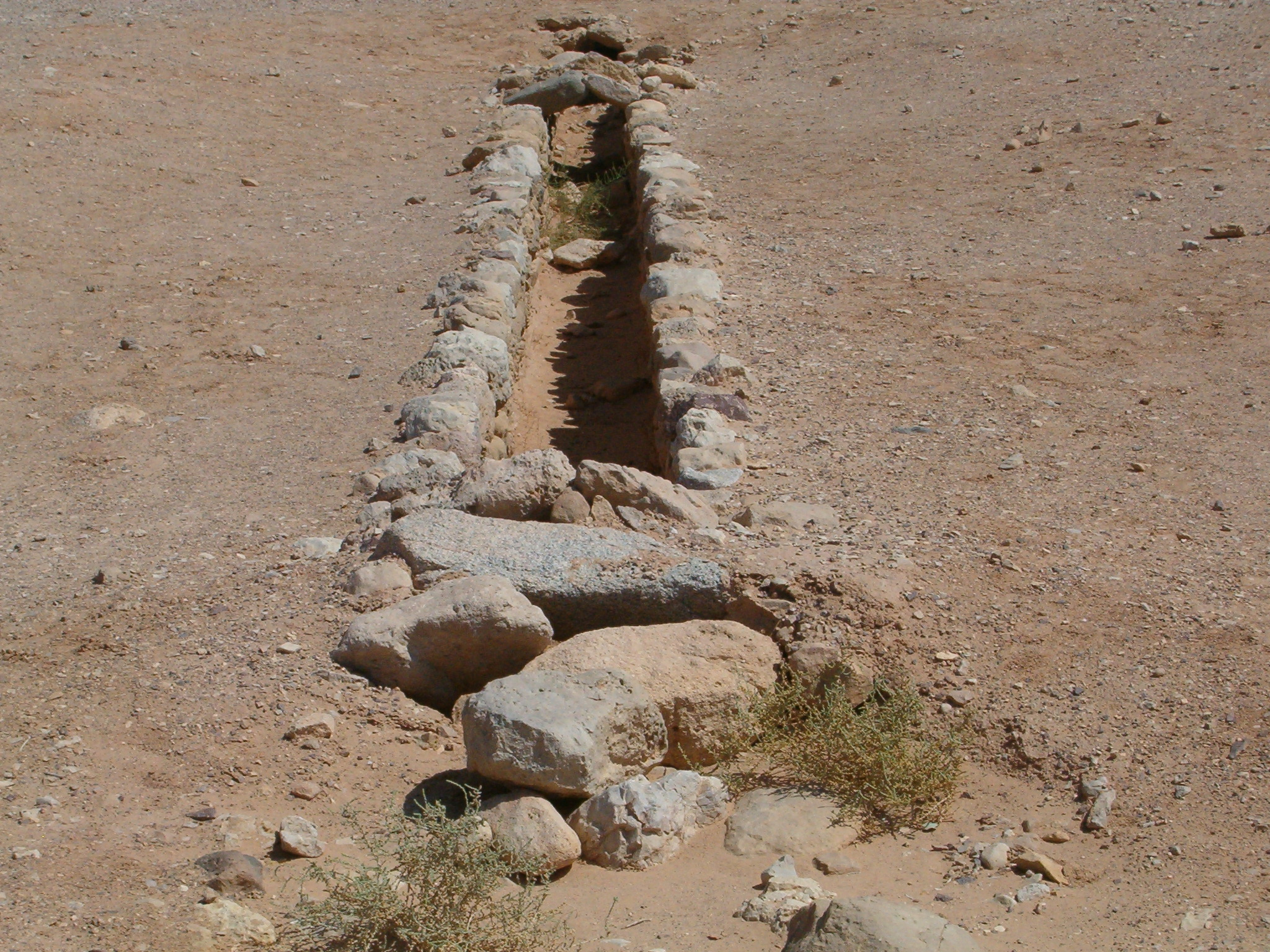 תעלת מים עתיקה בעברונה.